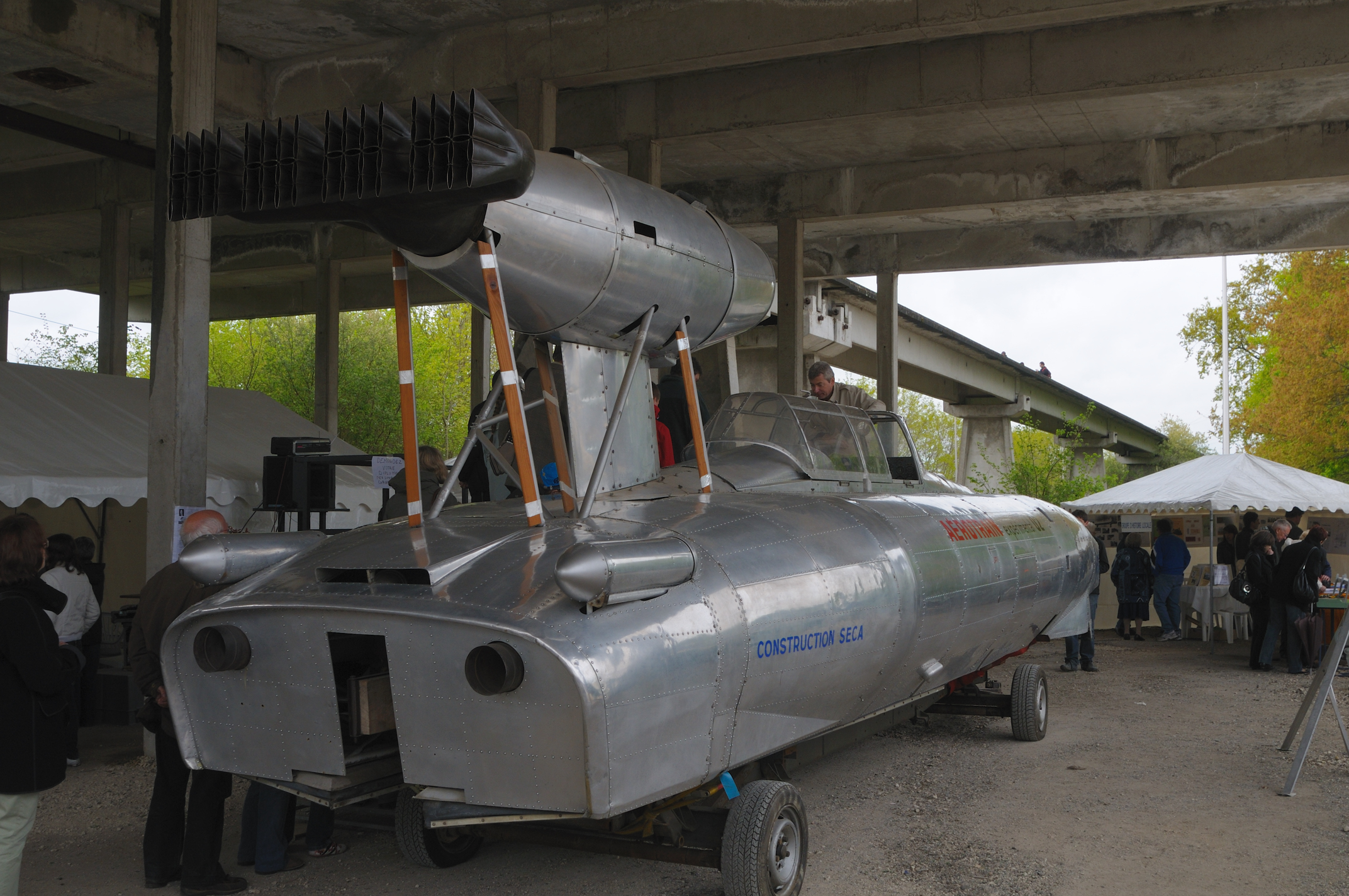 Prototype 02 de l'aérotrain conçu par Jean Bertin lors d'une exposition à Saran, Loiret, France